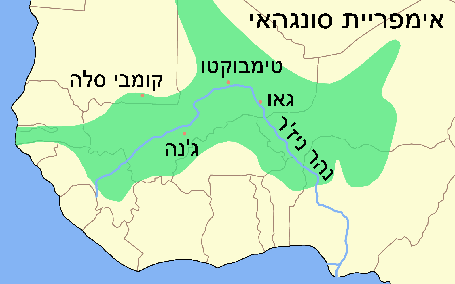 SONGHAI empire map